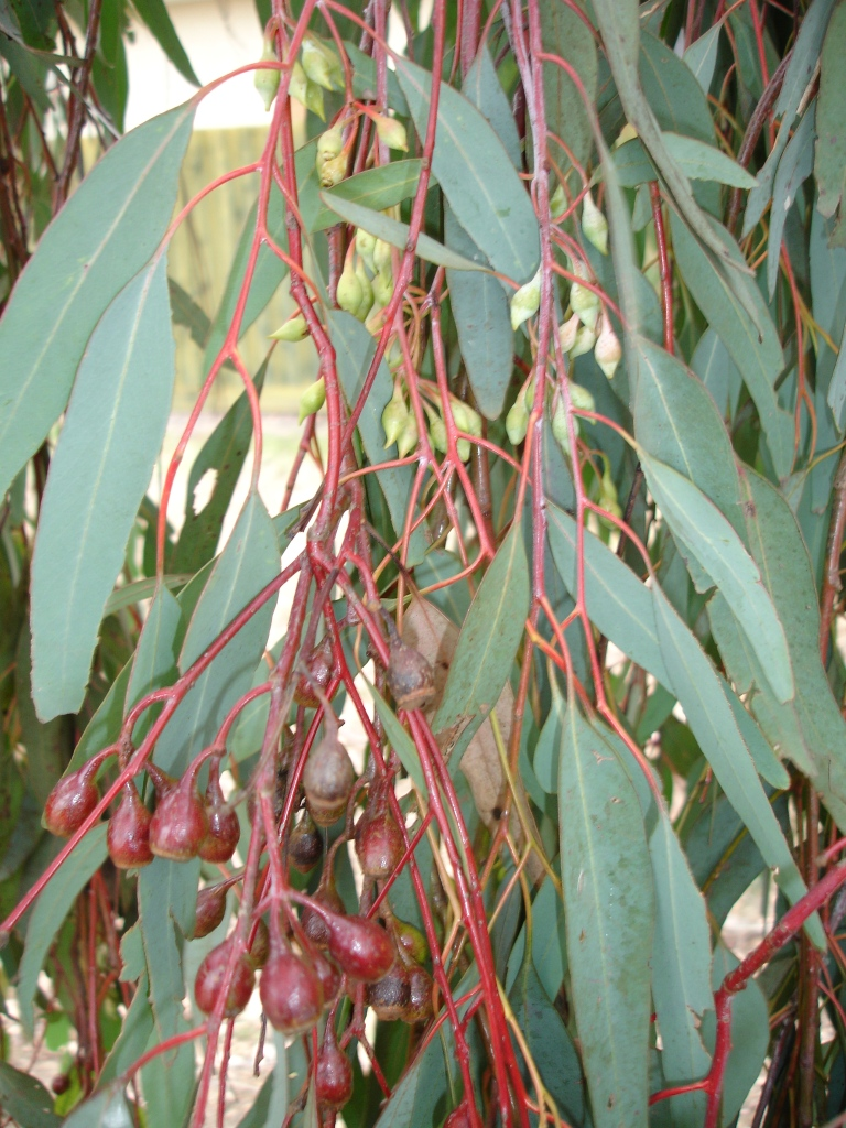 Eucalyptus sideroxylon, leaves, stems, petioles, branchlets, buds & capsules